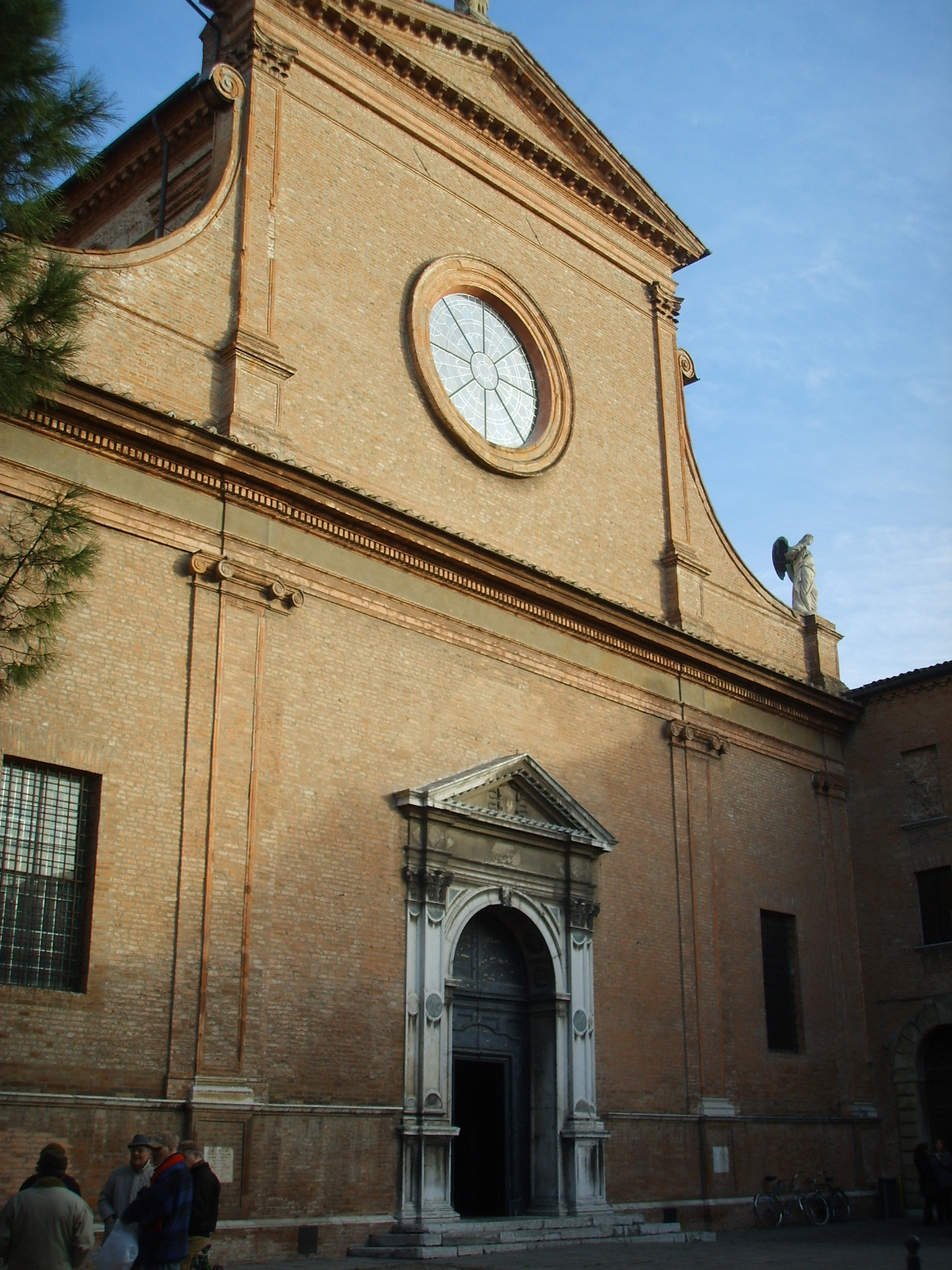 Ferrara, santa maria in vado, facciata